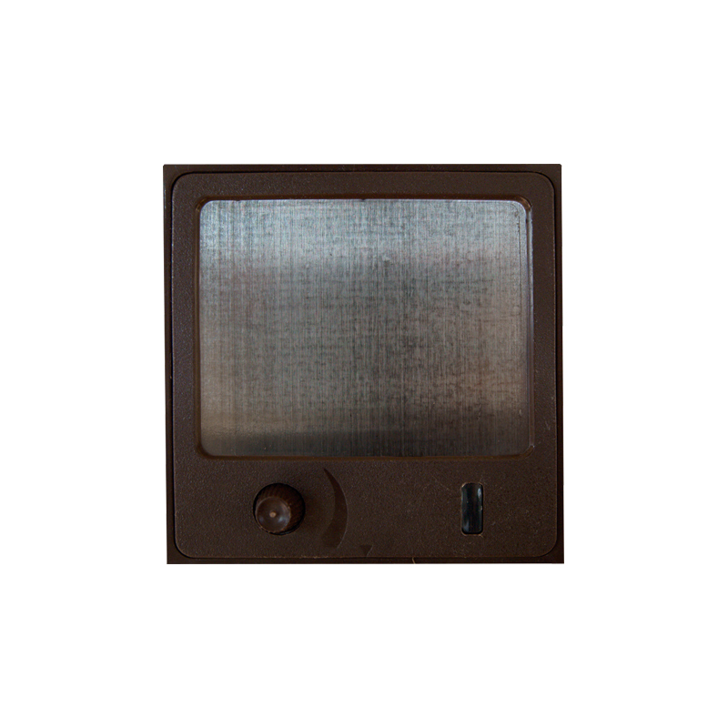 Ściemniacz dotykowy, 1991 rok. Ówczesna nazwa producenta: Południowe Zakłady Przemysłu Elektrotechnicznego „POLAM-KONTAKT”.